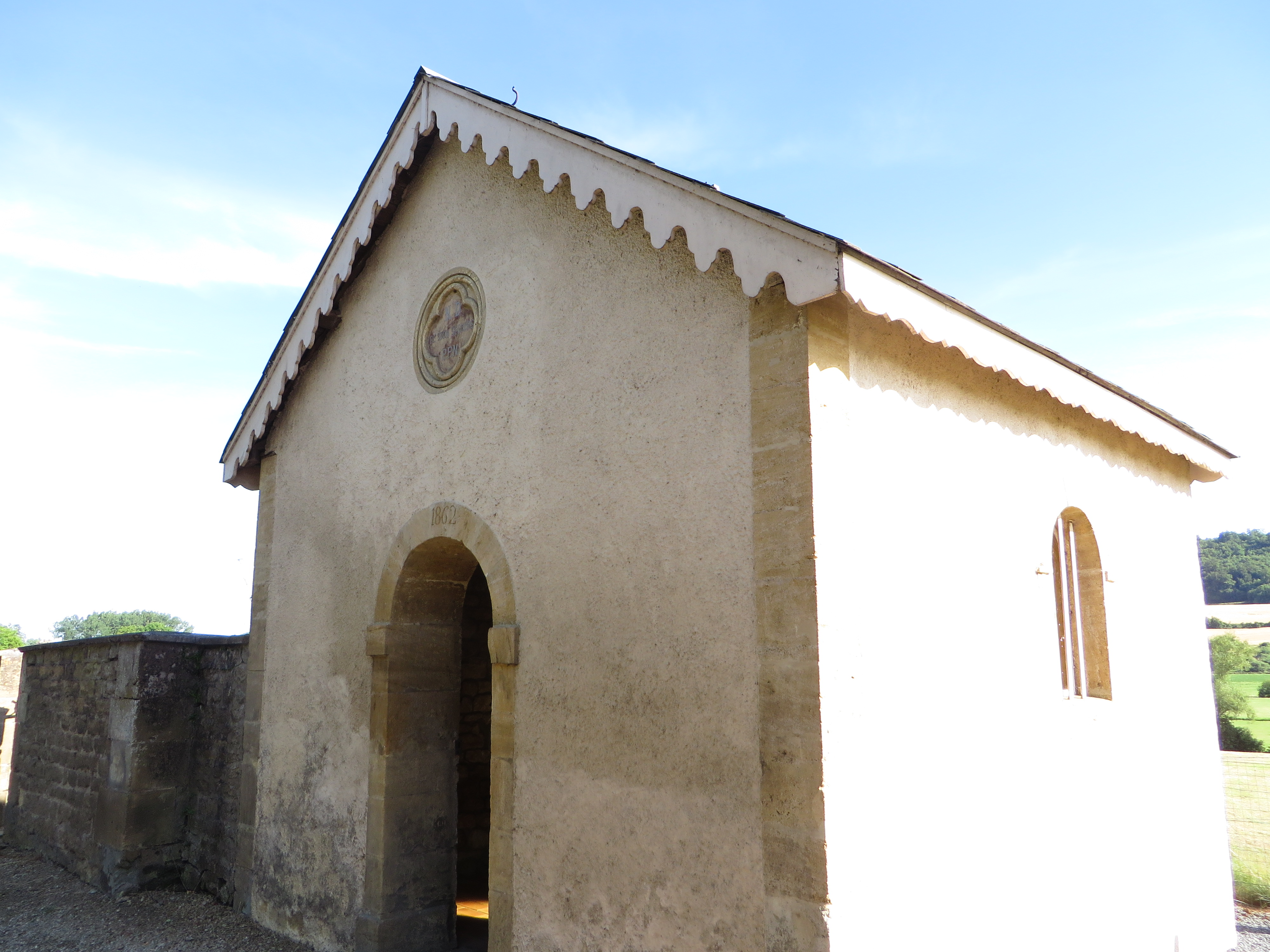 Verneuil-Grand La chapelle Notre-Dame-de-Bon-Secours